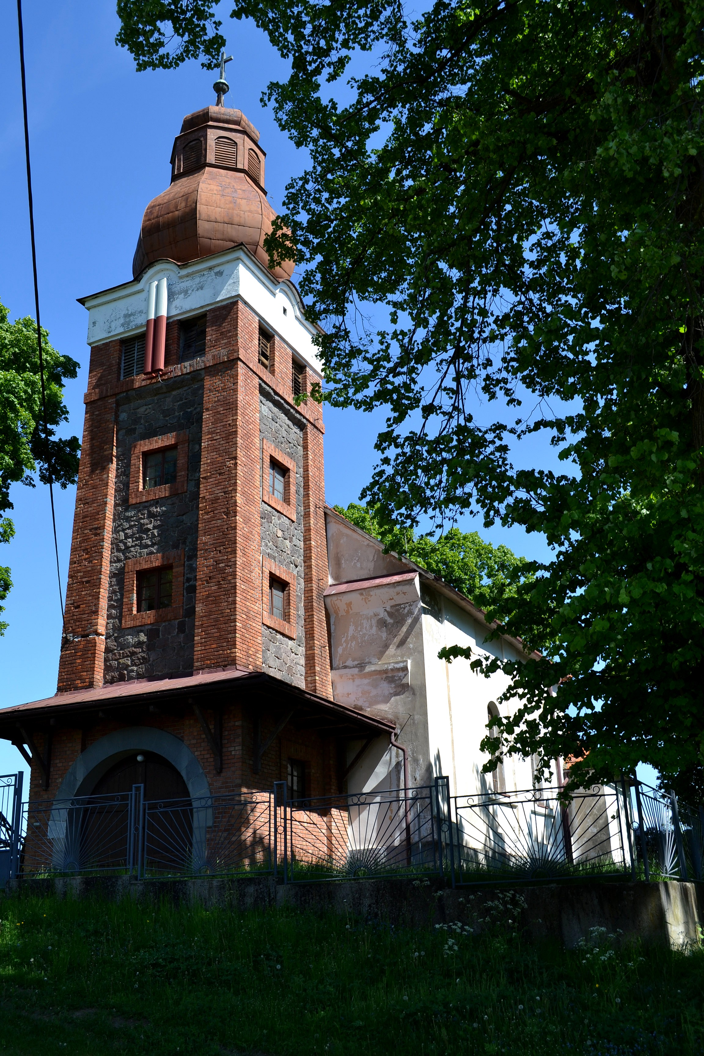 Evanjelický kostol v obci Žibritov (okr. Krupina)